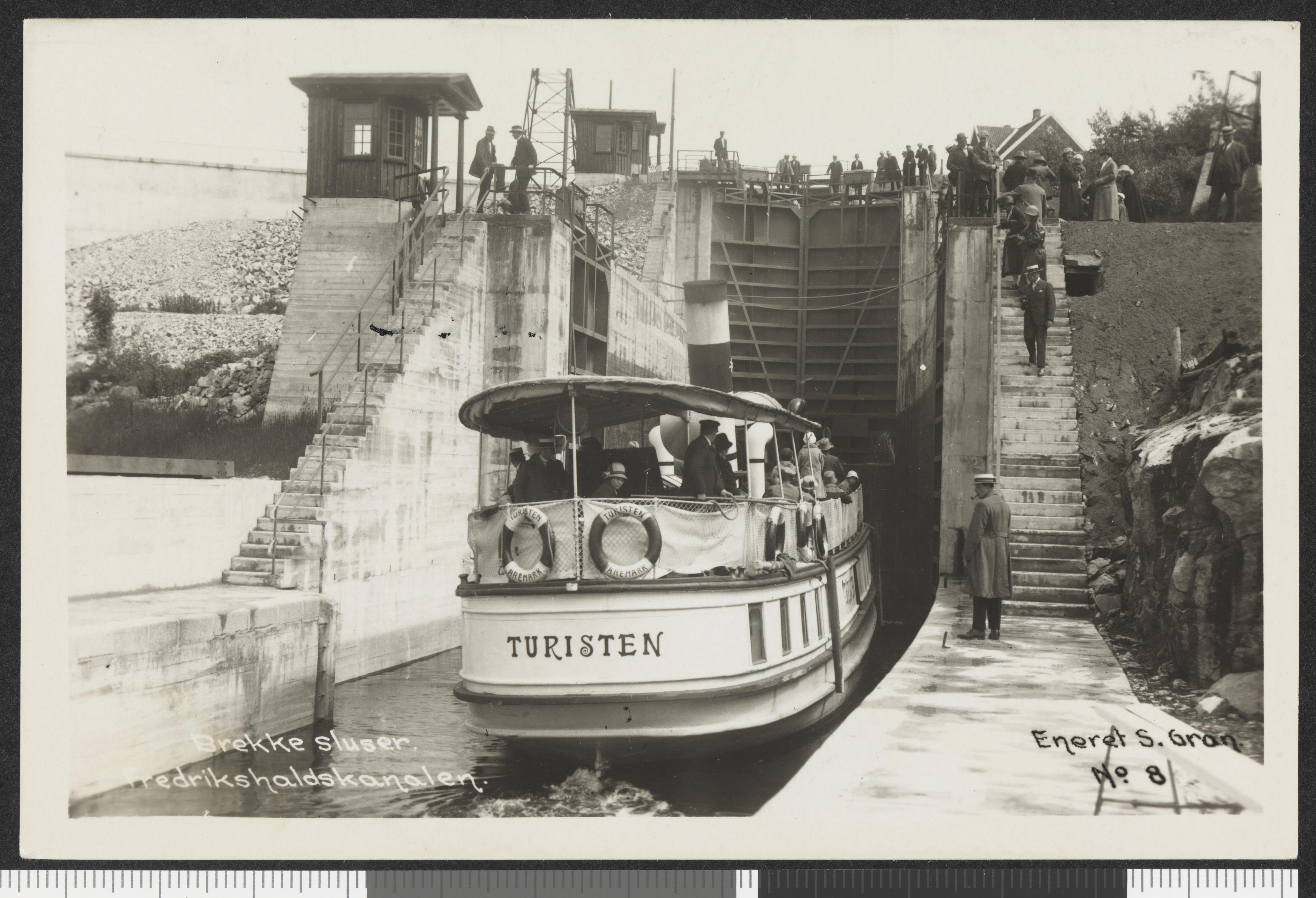 Bildet er hentet fra Nasjonalbibliotekets bildesamling Brekke,Brekke sluser, Halden, Østfold